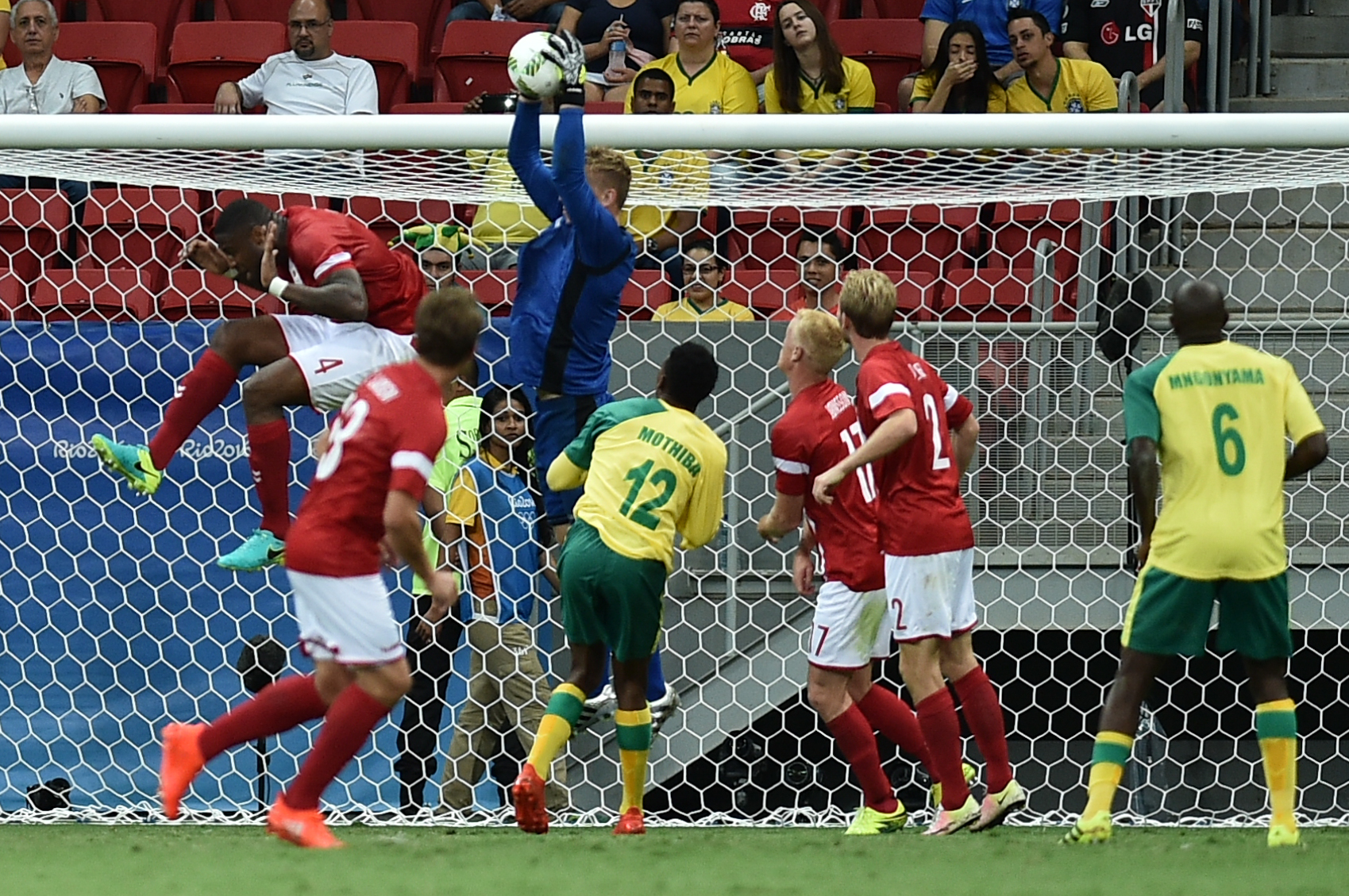 Estádio Nacional de Brasília Mané Garrincha, Brasília, DF, Brasil, 7/8/2016 Foto: Andre Borges/Agência Brasília. Dinamarca e África do Sul jogam neste domingo (7), no Estádio Mané Garrincha, pelo grupo A do futebol masculino nas Olimpíadas 2016. A Dinamarca venceu a África do Sul por 1x0, com gol de Robert Skov no segundo tempo.